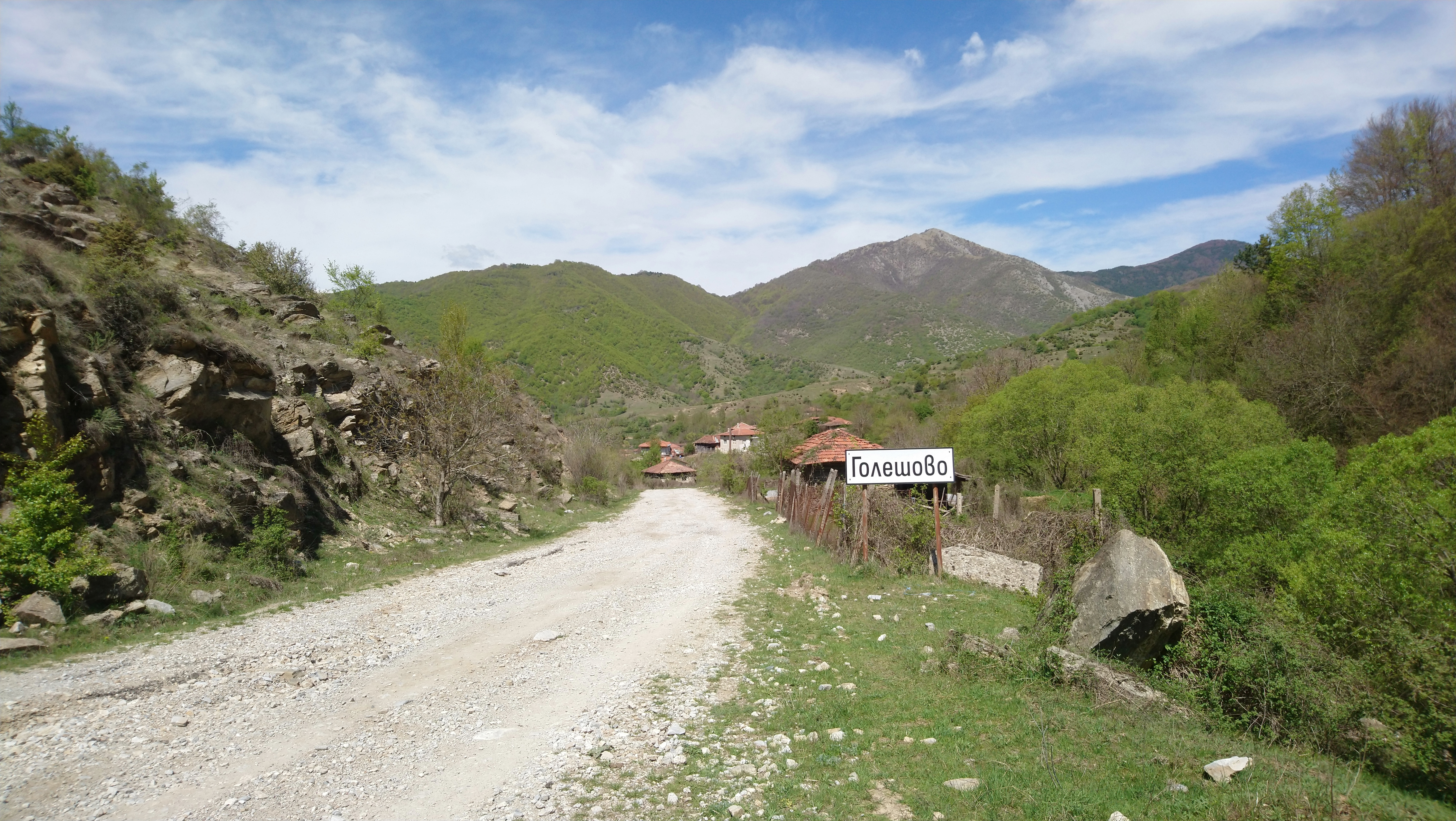 Табелата на входа на село Голешово